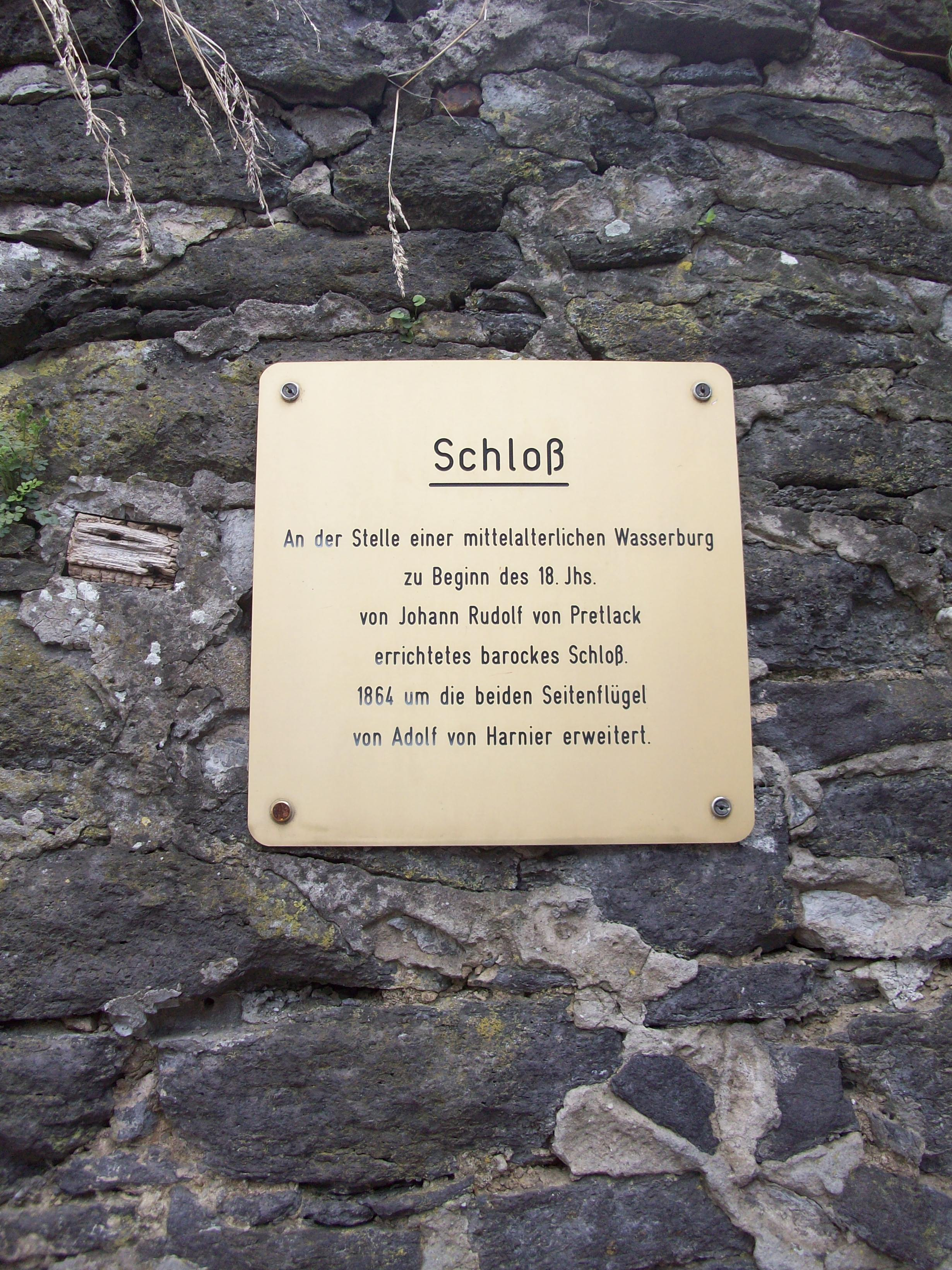 Echzeller Burg (eigentlich heute ein Schloss): Informationsschild an der Burgmauer